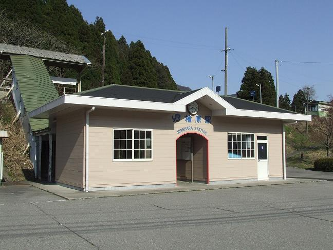 JR楡原駅駅舎